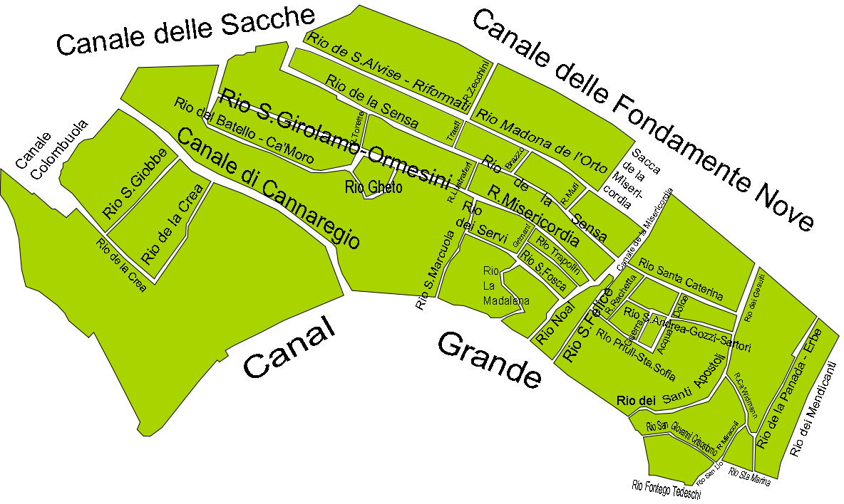 plan des canaux de cannaregio-venise